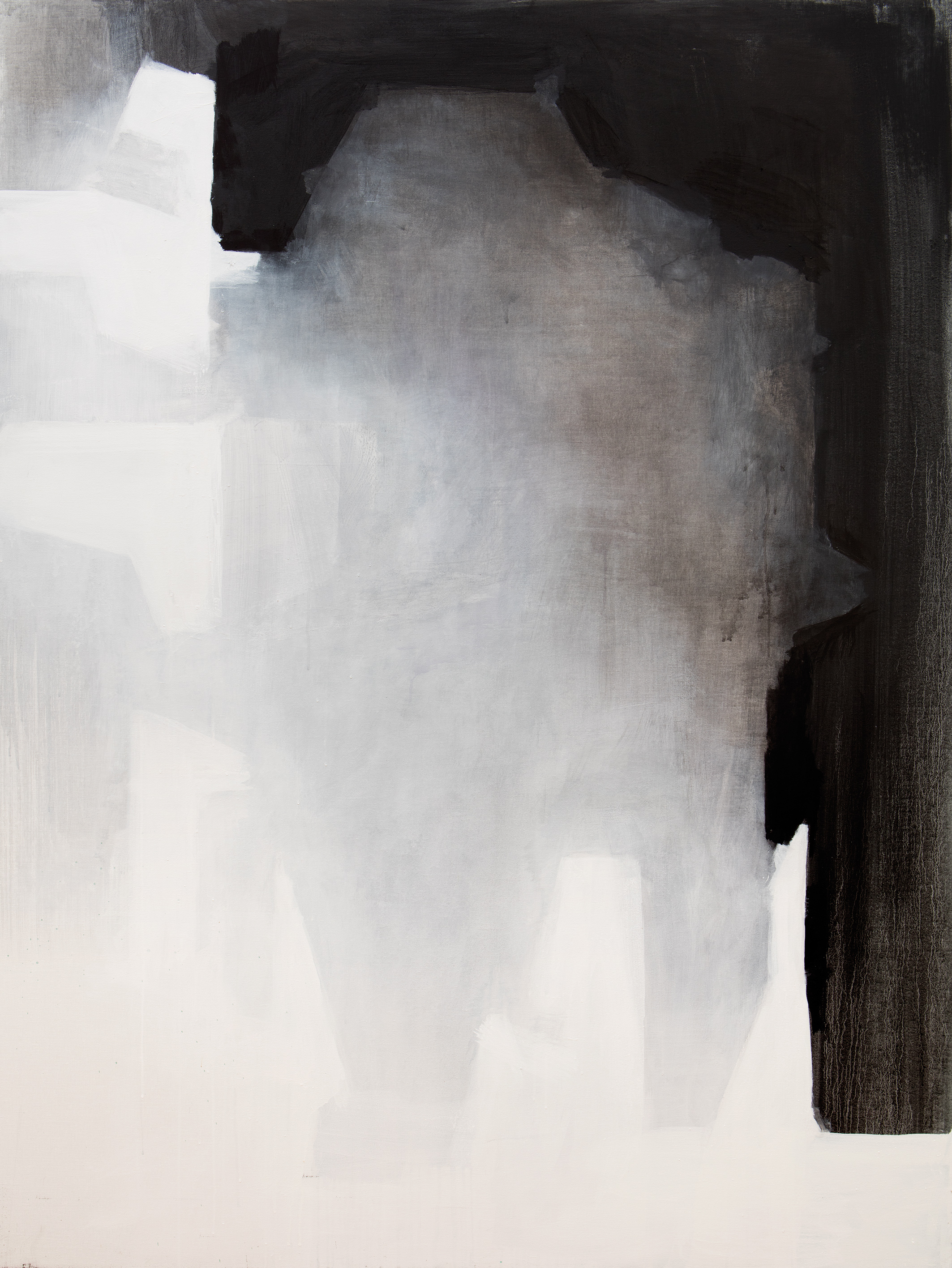 Gemälde von Walter Vopava, ohne Titel, 2016, 200x150cm